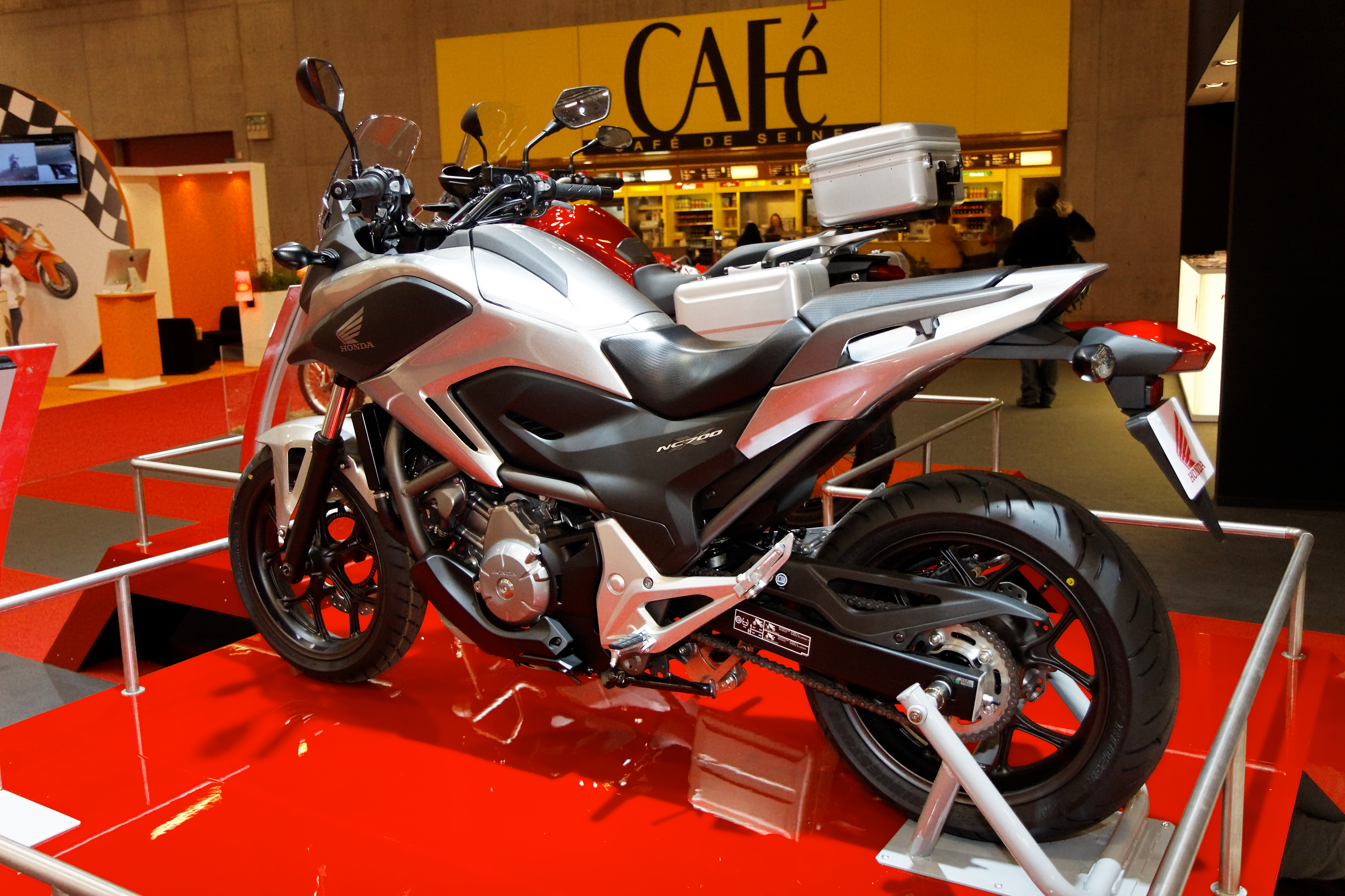 Honda - NC 700 S